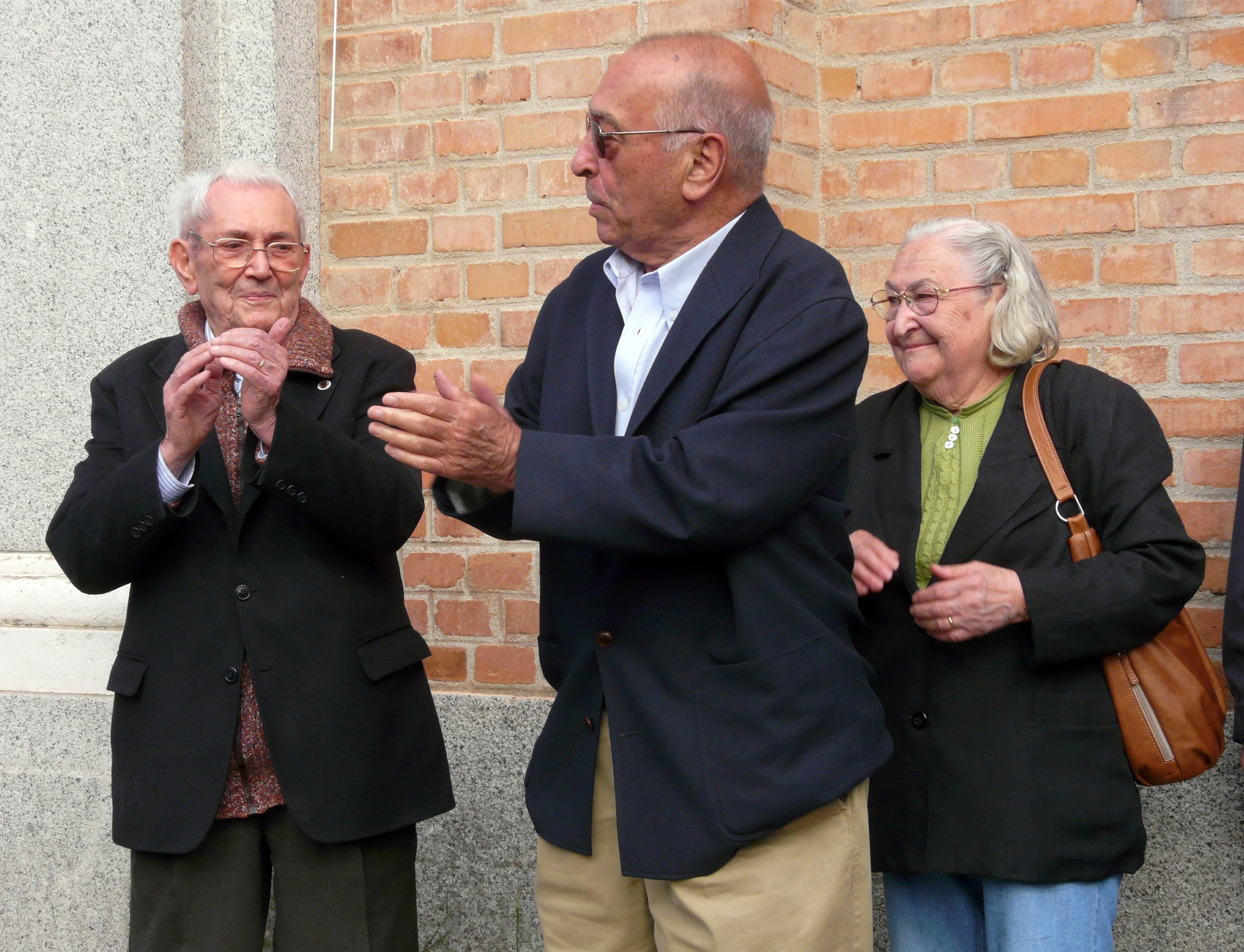 Marcelino Camacho, Nicolás Redondo y Josefina Samper (de derecha izquierda a derecha), en el acto en el que se descubrió una placa en la cárcel de Carabanchel en recuerdo a los presos políticos. Todos los datos aquí.